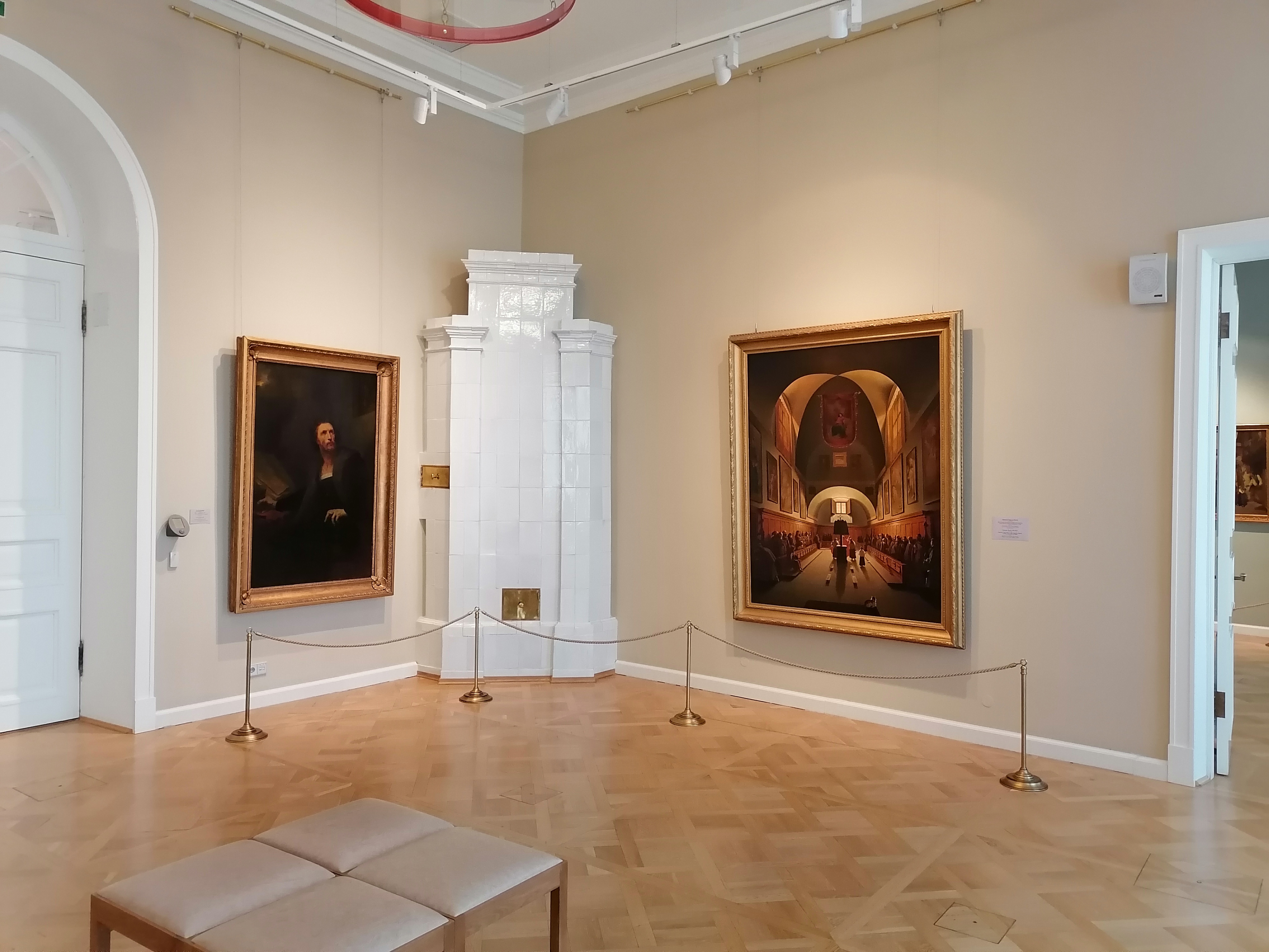 Здание Главного штаба - зал 306 - Ари Шеффер "Фауст с чашей яда", Франсуа Мариус Гране "Внутренний вид хоров в церкви капуцинского монастыря в на площади Барберини в Риме"